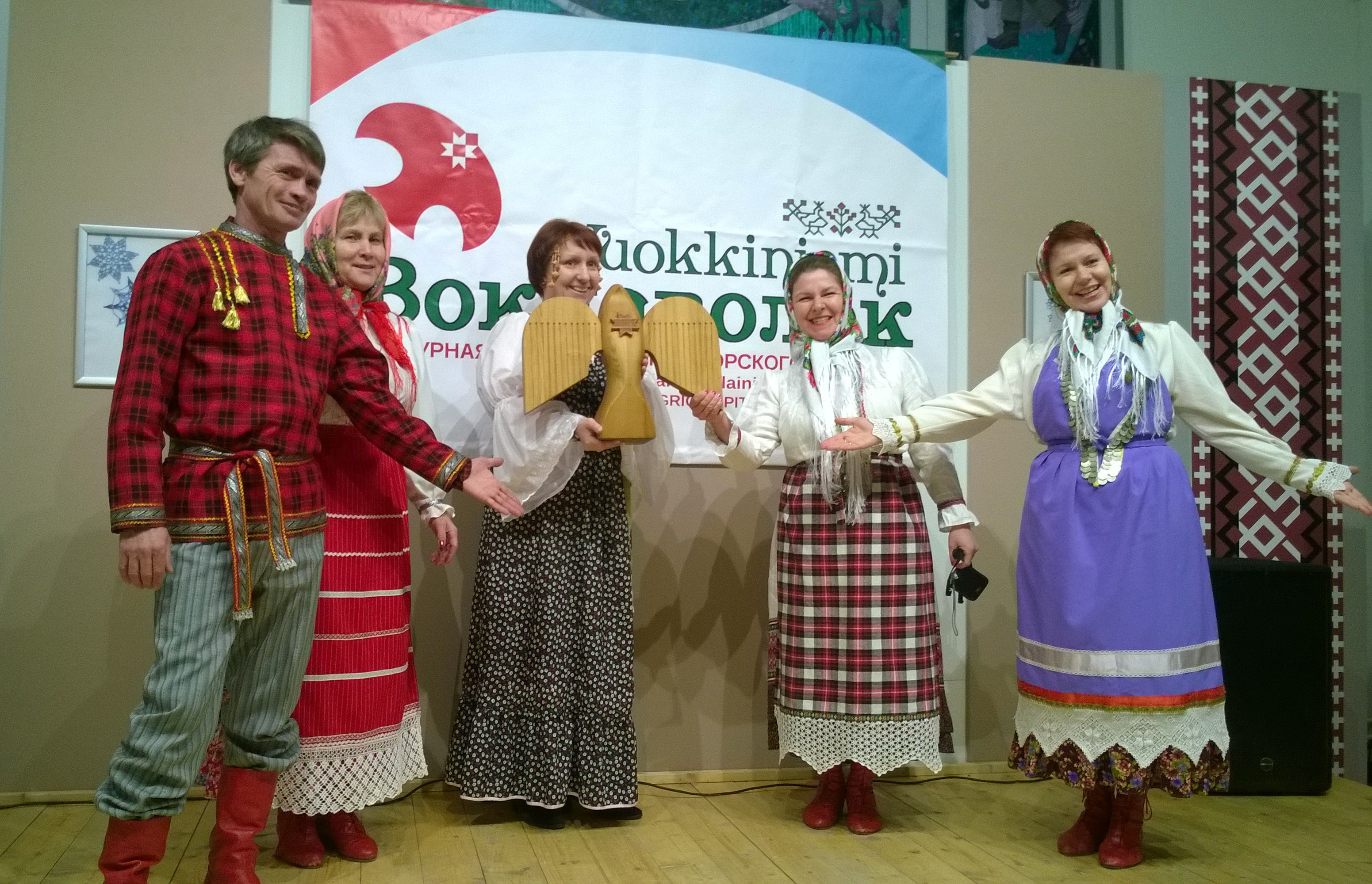 Kulttuuripääkaupunki avajaiset Vuokkiniemen kylätalossa 7.1.2017